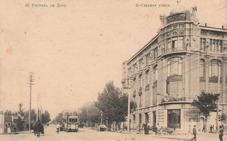 Ростов-на-Дону универмаг Проводник